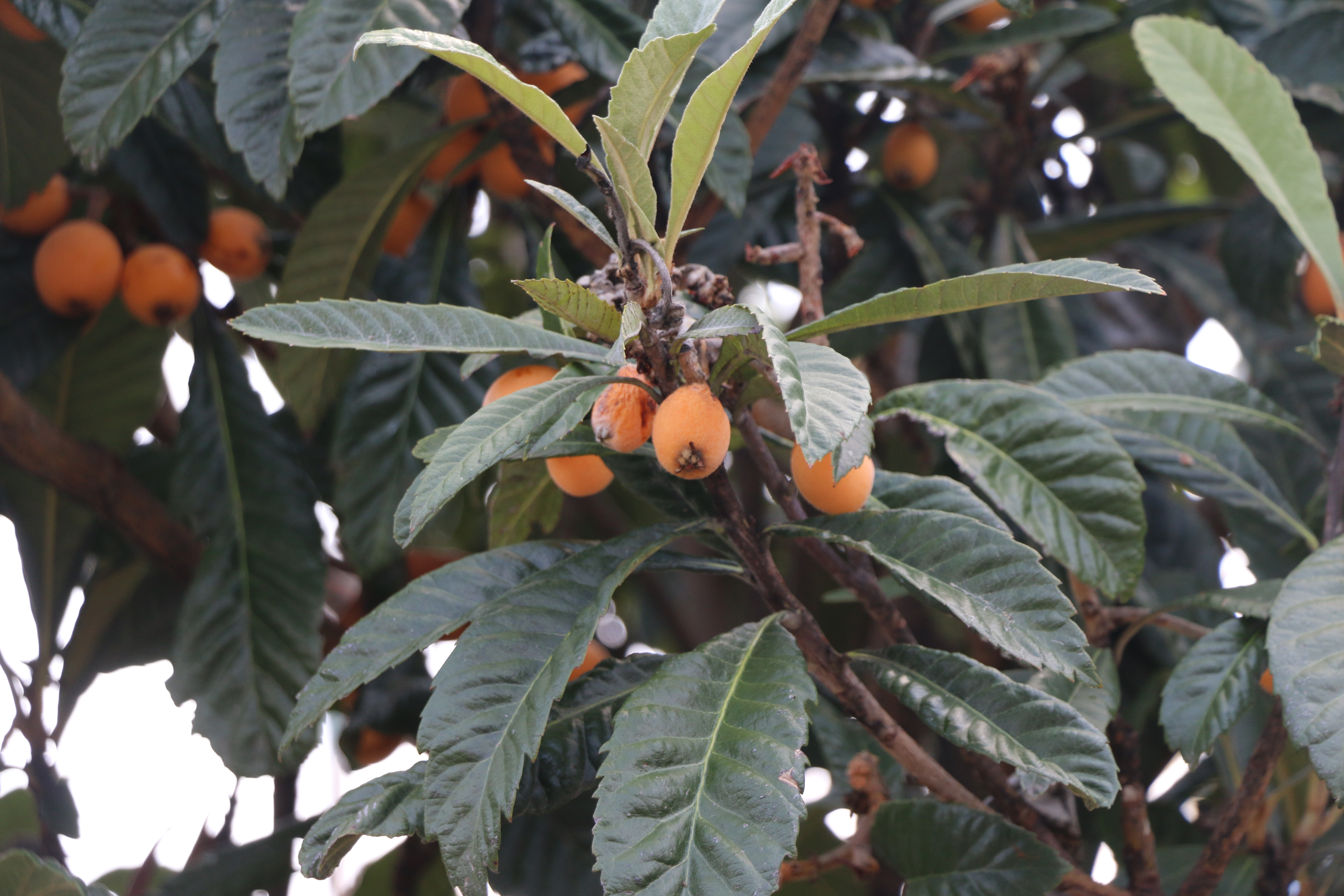 飯田市内にある田中芳男顕彰碑脇にある田中ビワ